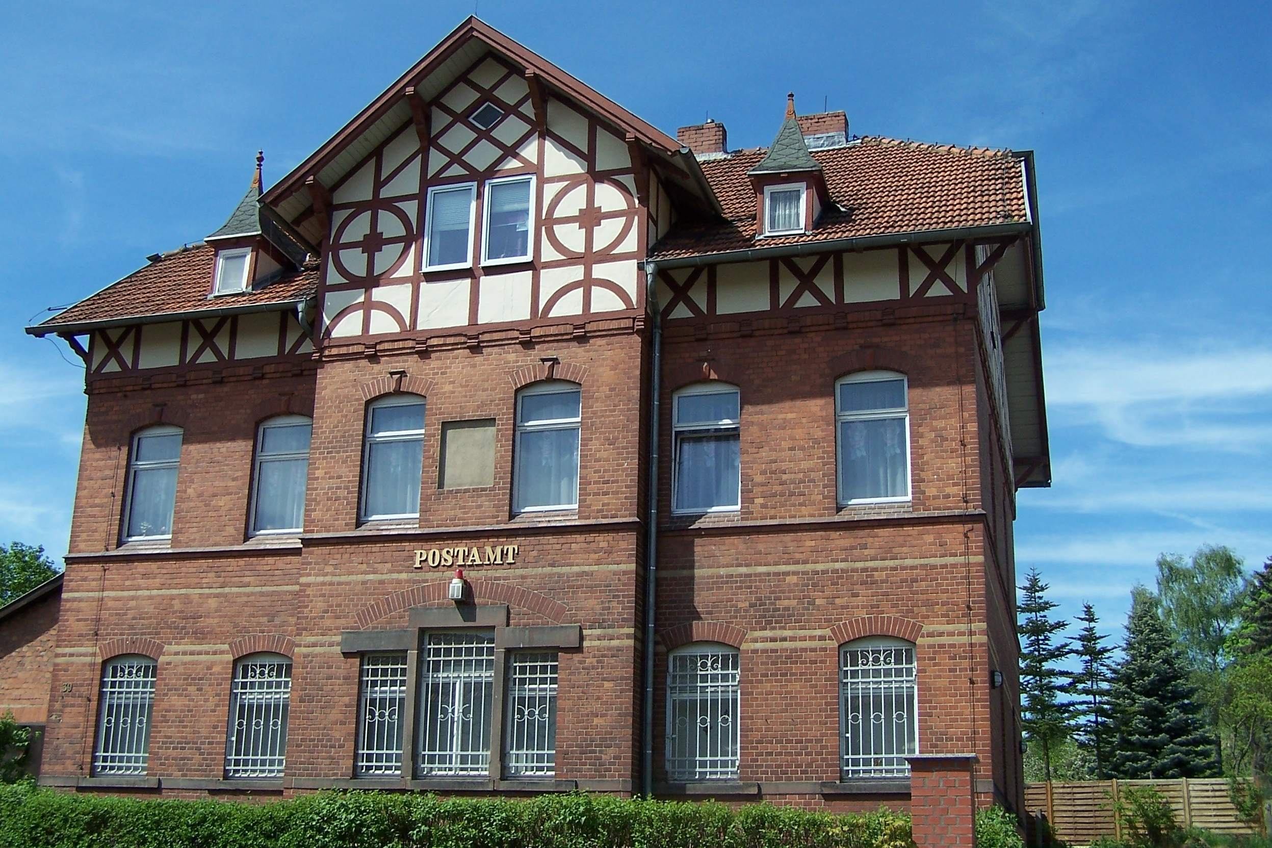 Das Alte Postamt in Kaltennordheim